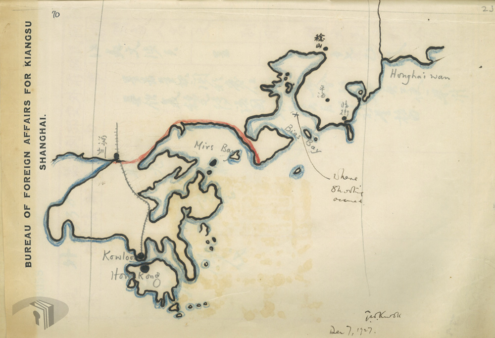 愛仁輪事件發生位置 檔號：0018/367.1/0007-1 案名：愛仁輪被英炮艦擊沉 來源機關：外交部 管有機關：國家發展委員會檔案管理局